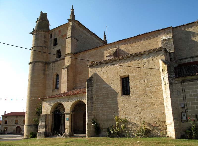 Iglesia de San Esteban en Orón, Miranda de Ebro